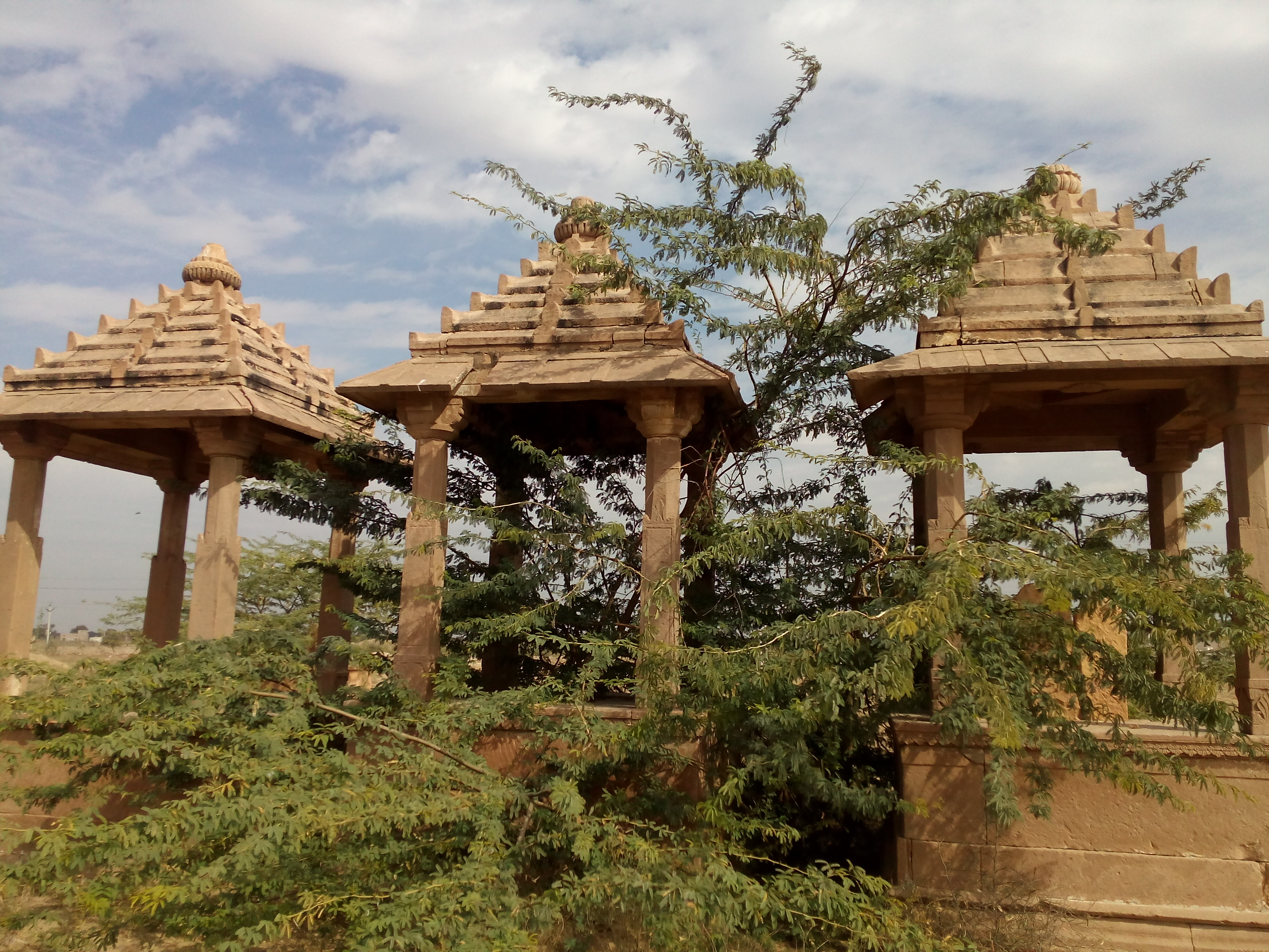 Old Rajputi Chhatri at Dewatu ,Jodhpur